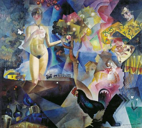 "Адам и Ева"